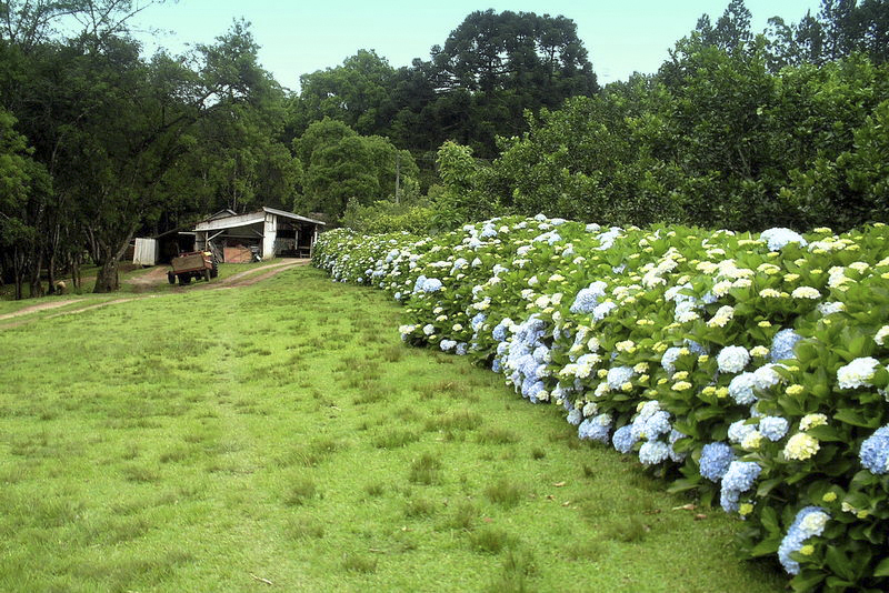 Chácara situada dentro do Circuito Italiano de Turismo Rural em Colombo, PR, Sul do Brasil.